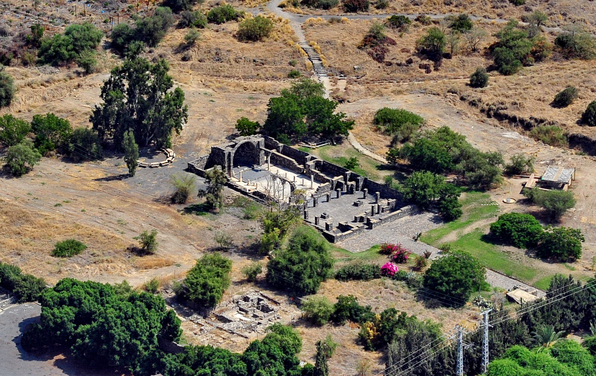 אתר ארכאולוגי לחופה המזרחי של הכנרת, ובו שרידיו של מנזר נוצרי, המתוארך למחצית המאה ה-5 לספירה. על פי המסורת הנוצרית מזוהה האתר עם מקום התרחשותו של "נס החזירים" שביצע ישו.